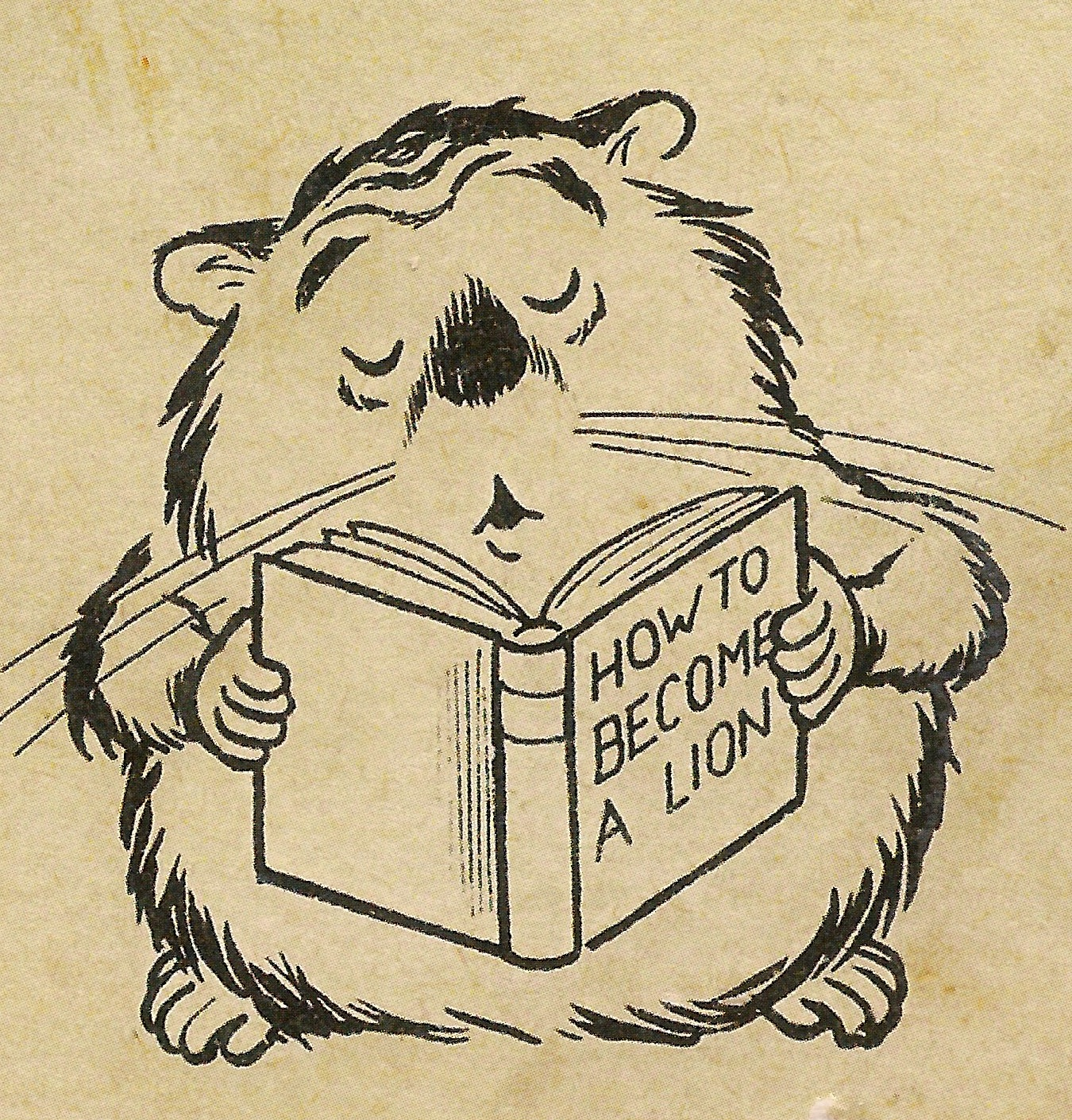 Maskot for Klubbstyret, Studentersamfundet i Trondhjem